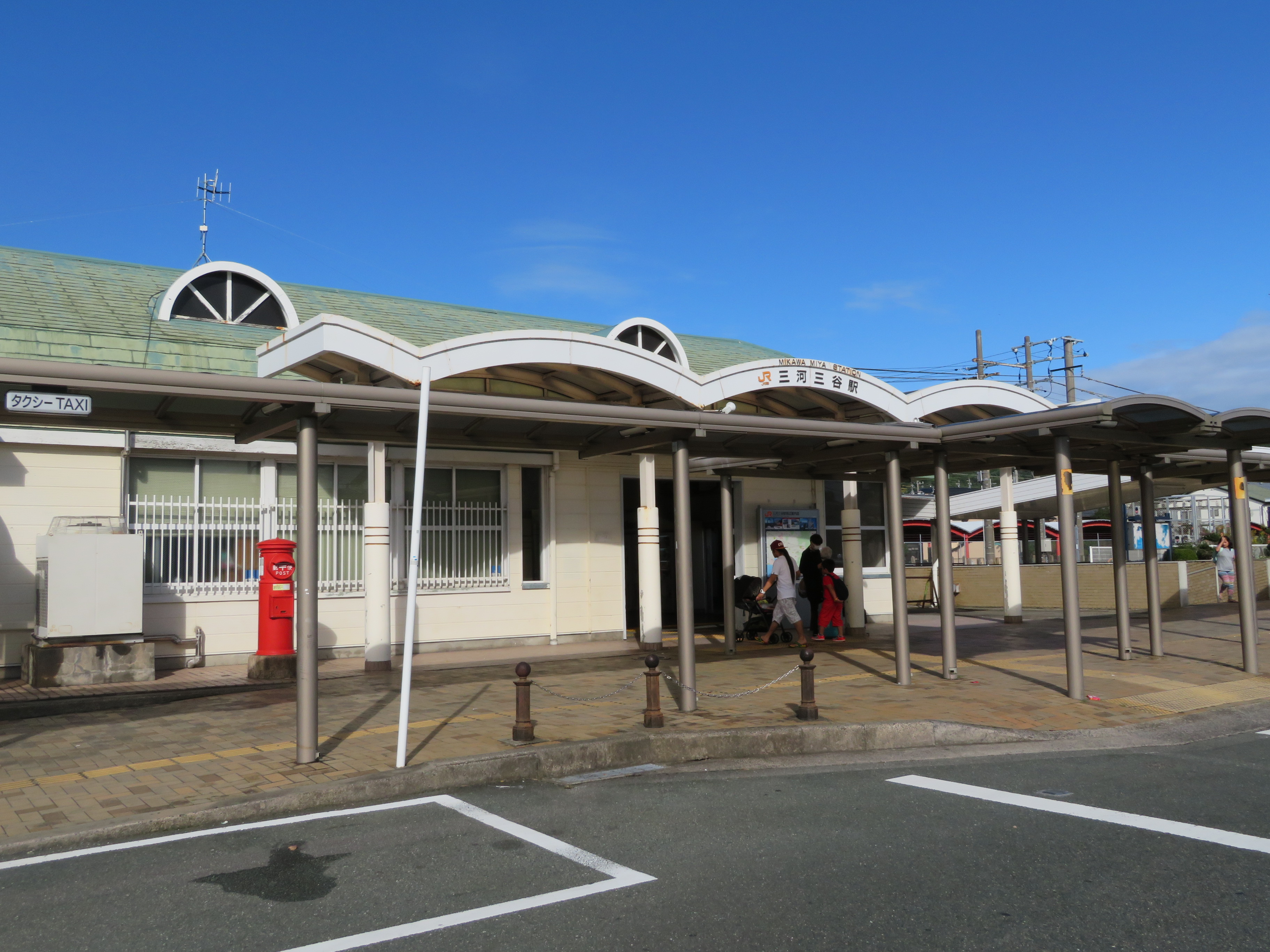 三河三谷駅（蒲郡市三谷町）